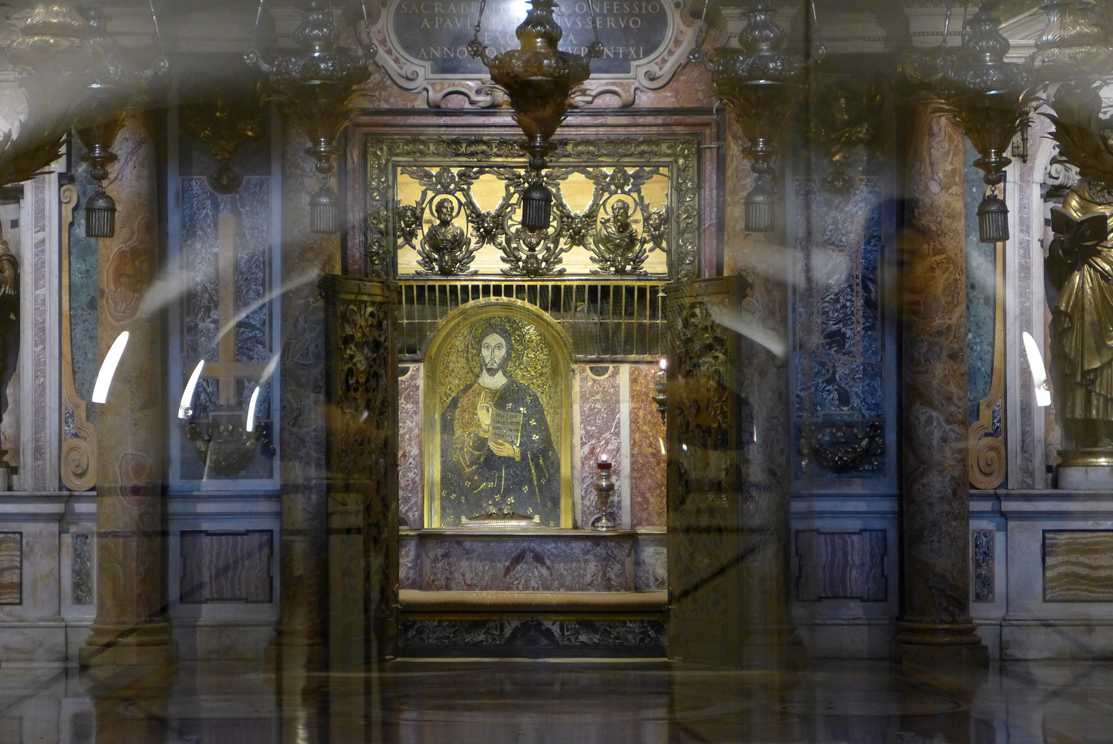 Das Petrusgrab im Petersdom in Rom